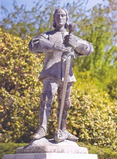 Estátua de D. Nuno Álvares Pereira em Cernache do Bonjardim